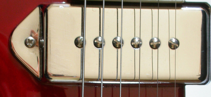 Gibson p90 dogear guitar pickup